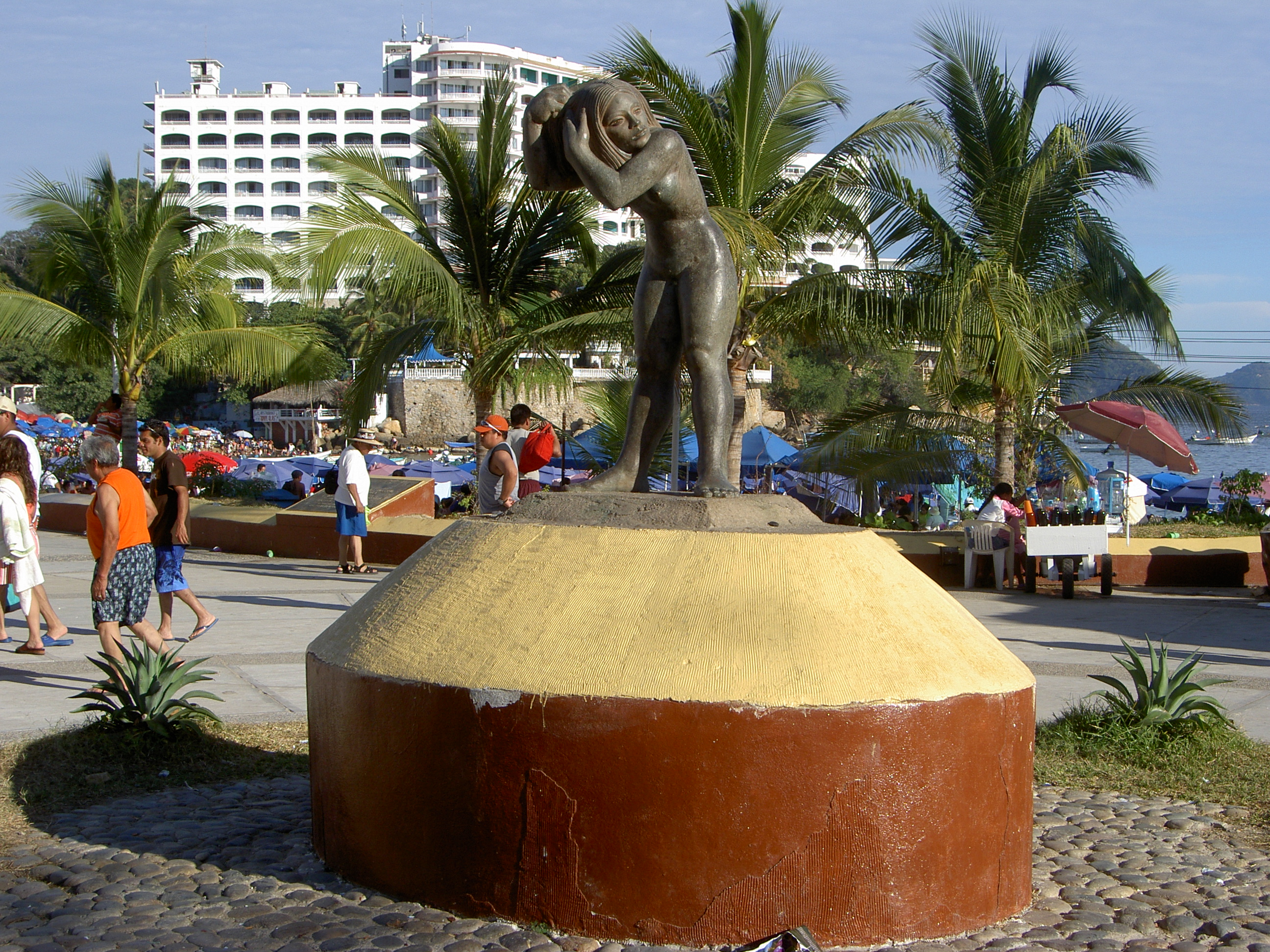 Estatua de la Playa Caleta en Acapulco, Guerrero, México.